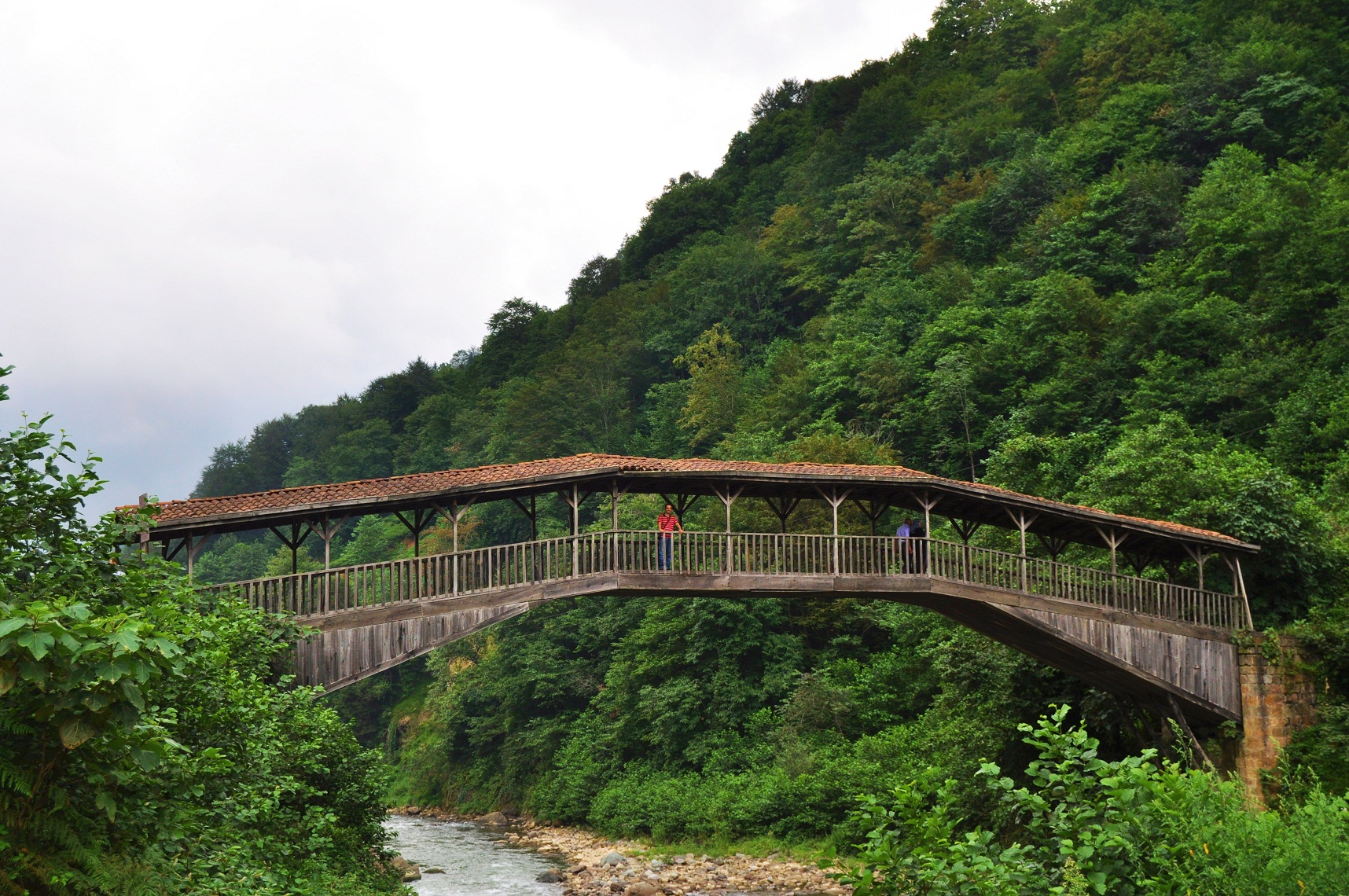 Hapsiyaş Köprüsü, Alt'tan yukarıya doğru bakış.